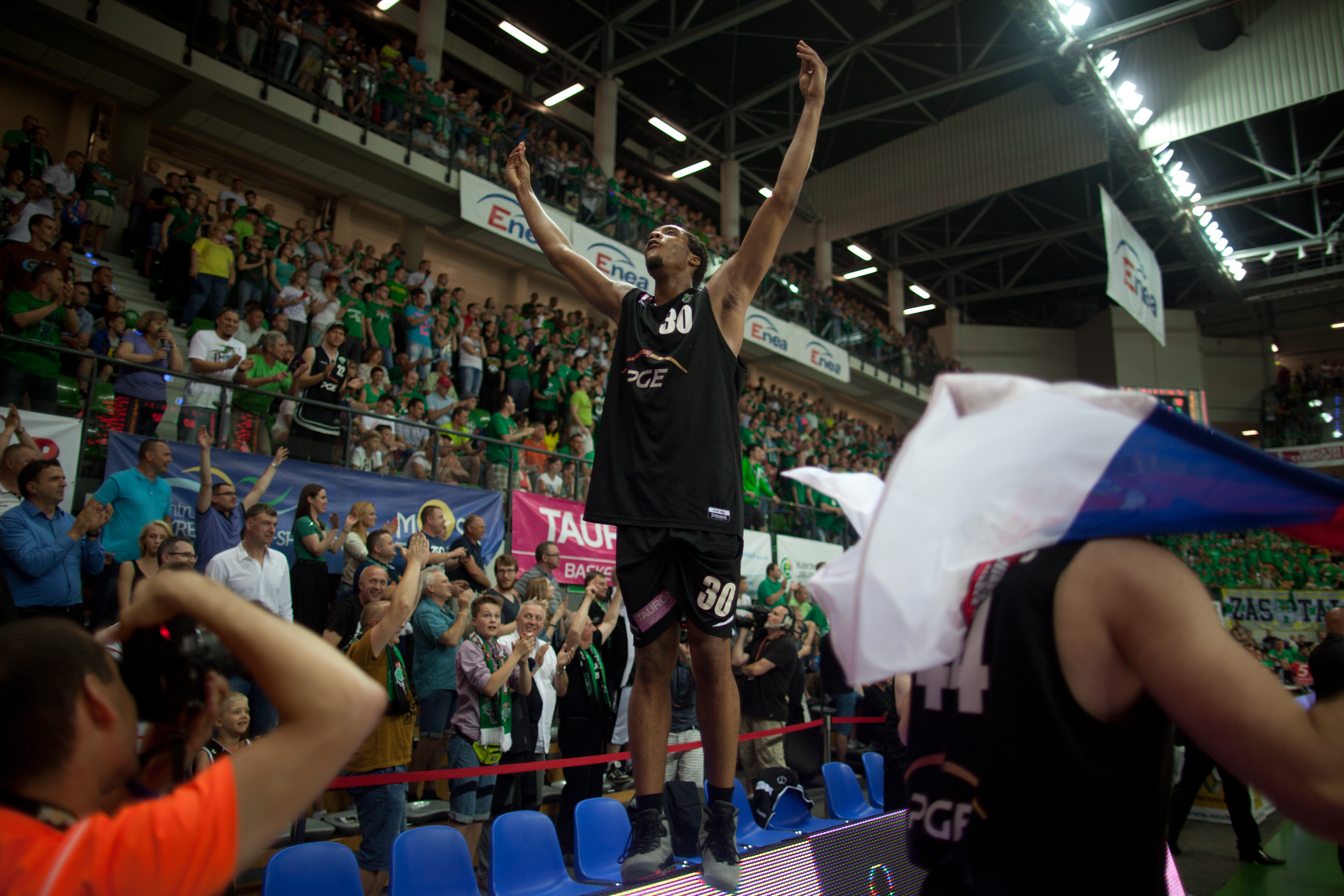 J.P. Prince PGE Turów Zgorzelec